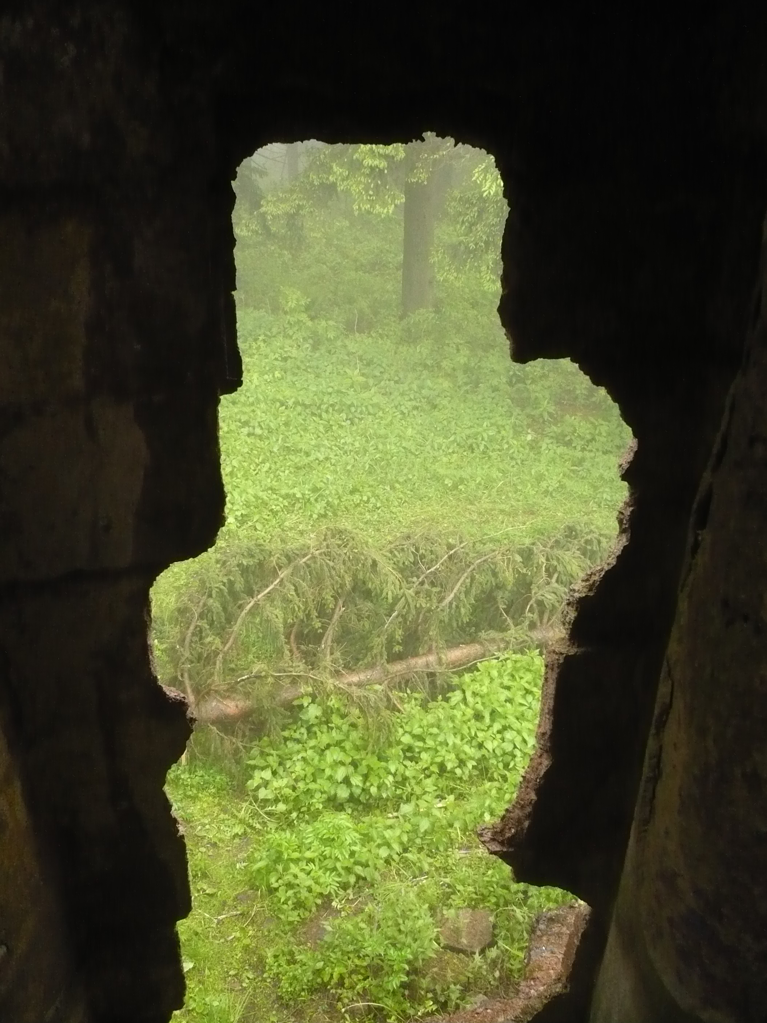 Włodzicka Góra. Wieża